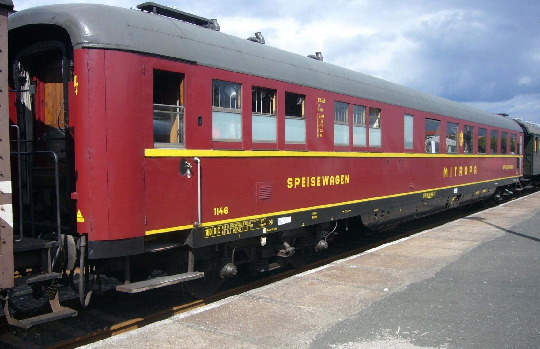 Schürzenspeisewagen des Traditionszug Berlin in der Ausstellung 60 Jahre Piko in Sonneberg